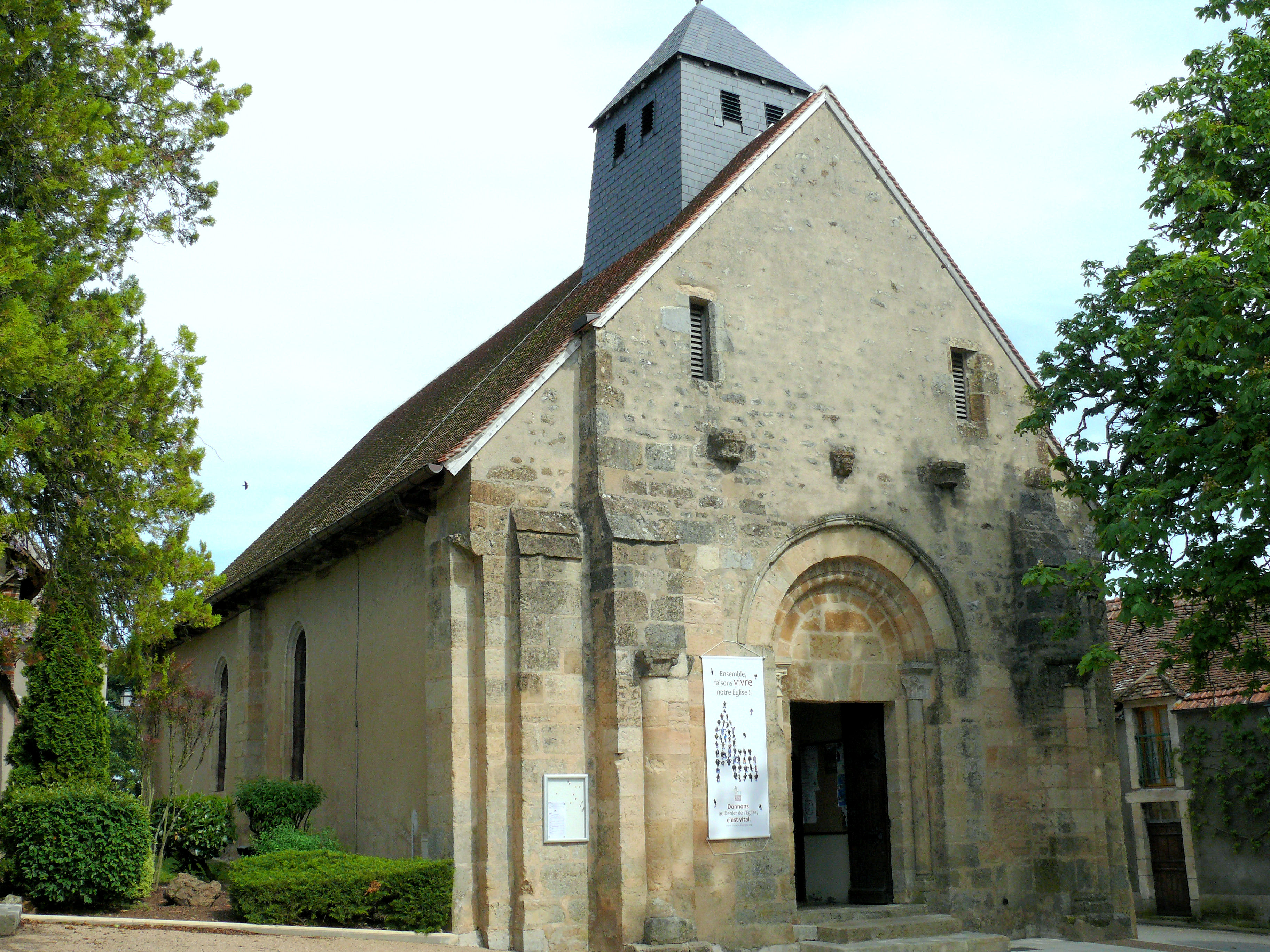 Orval (Cher) - Eglise Saint-Hilaire - Façade occidentale